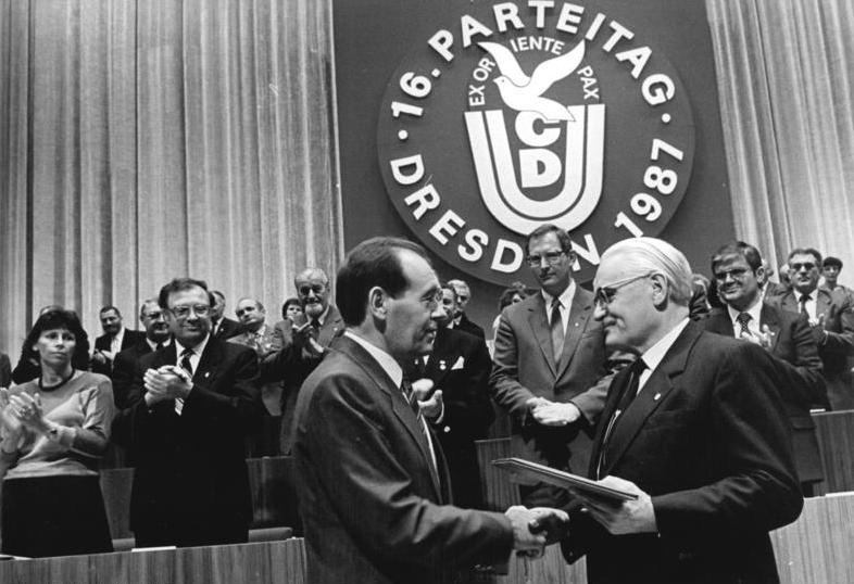 ADN-ZB Häßler 15.10.87 Dresden: 16. Parteitag der CDU Die Grüße der Partei der Arbeiterklasse an die Delegierten des CDU-Parteitages überbrachte im Auftrage des ZK der SED und besonders seines Generalsekretärs, des Vorsitzenden des Staatsrates der DDR, Erich Honecker, der Leiter der Delegation des ZK, Joachim Herrmann (vorn l.), Mitglied des Politbüros und Sekretär des ZK. Er überreichte die Grußadresse des ZK der SED Gerald Götting, Vorsitzender der CDU.